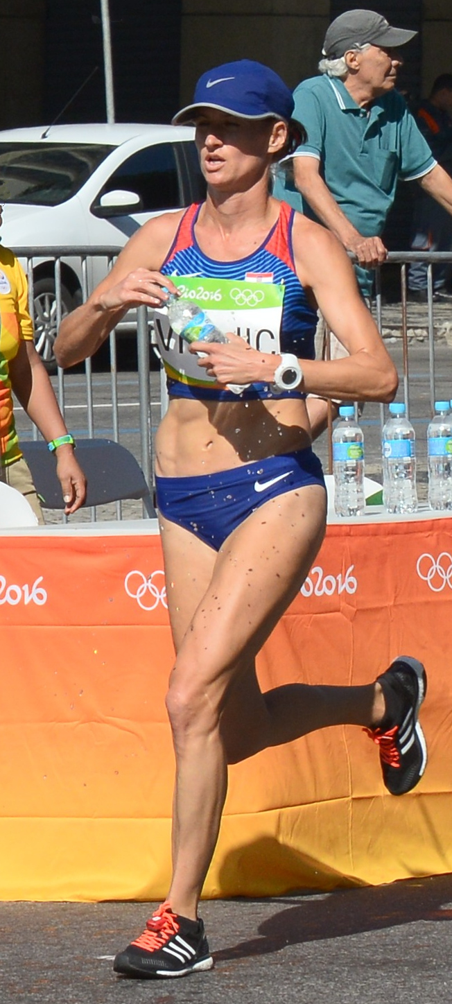 Passage du marathon des jeux olympiques de Rio 2016 dans le centre de Rio